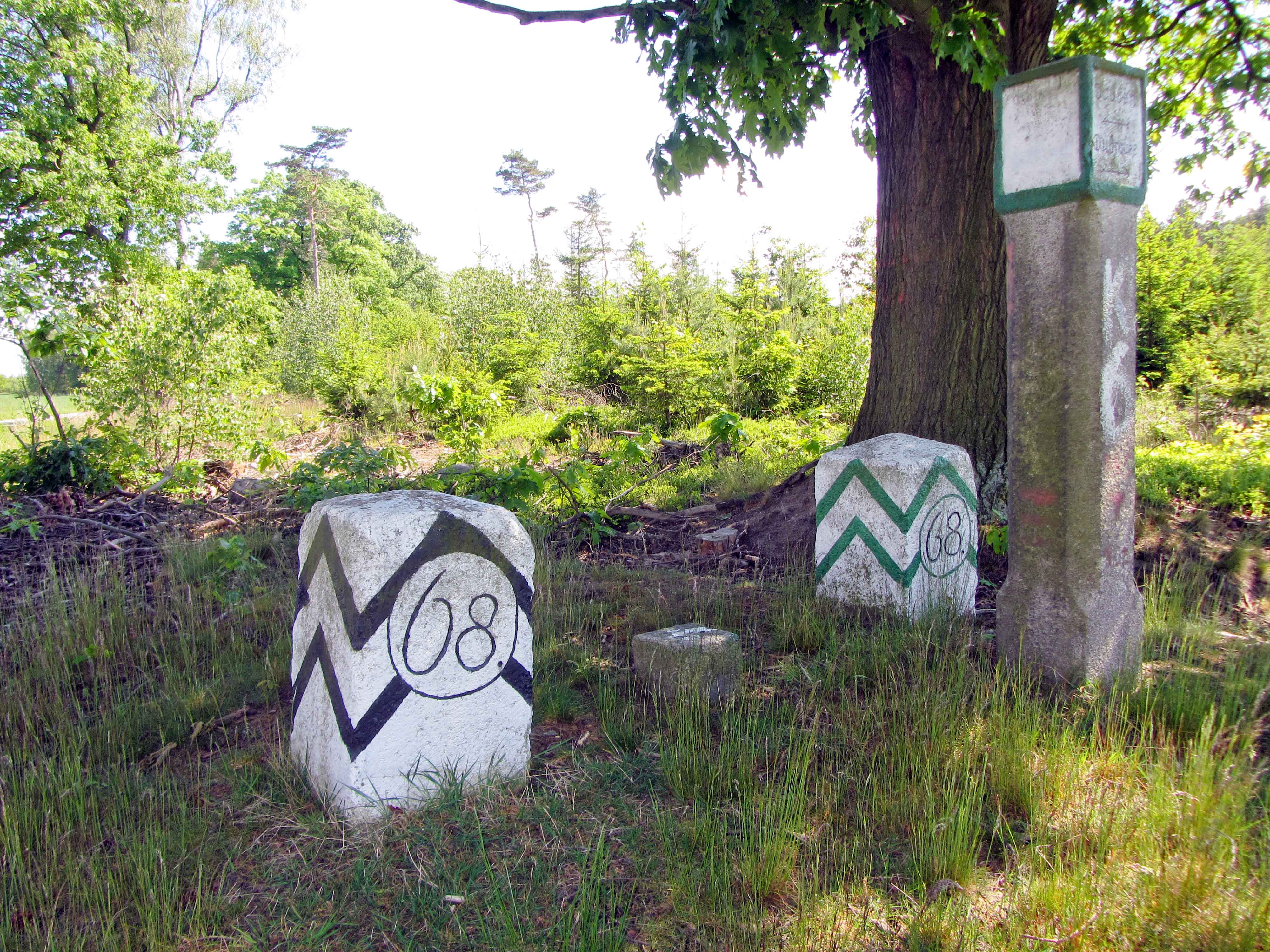 Grenzstein Nr. 68 Historische Landesgrenze Königreich Sachsen Königreich Preußen 1815 (Wiener Kongress) Hornjoserbsce: Historiski saksko-pruski měznik čo. 68 a kamjentny pućnik při starym puću wot Duboho do Dubrawki